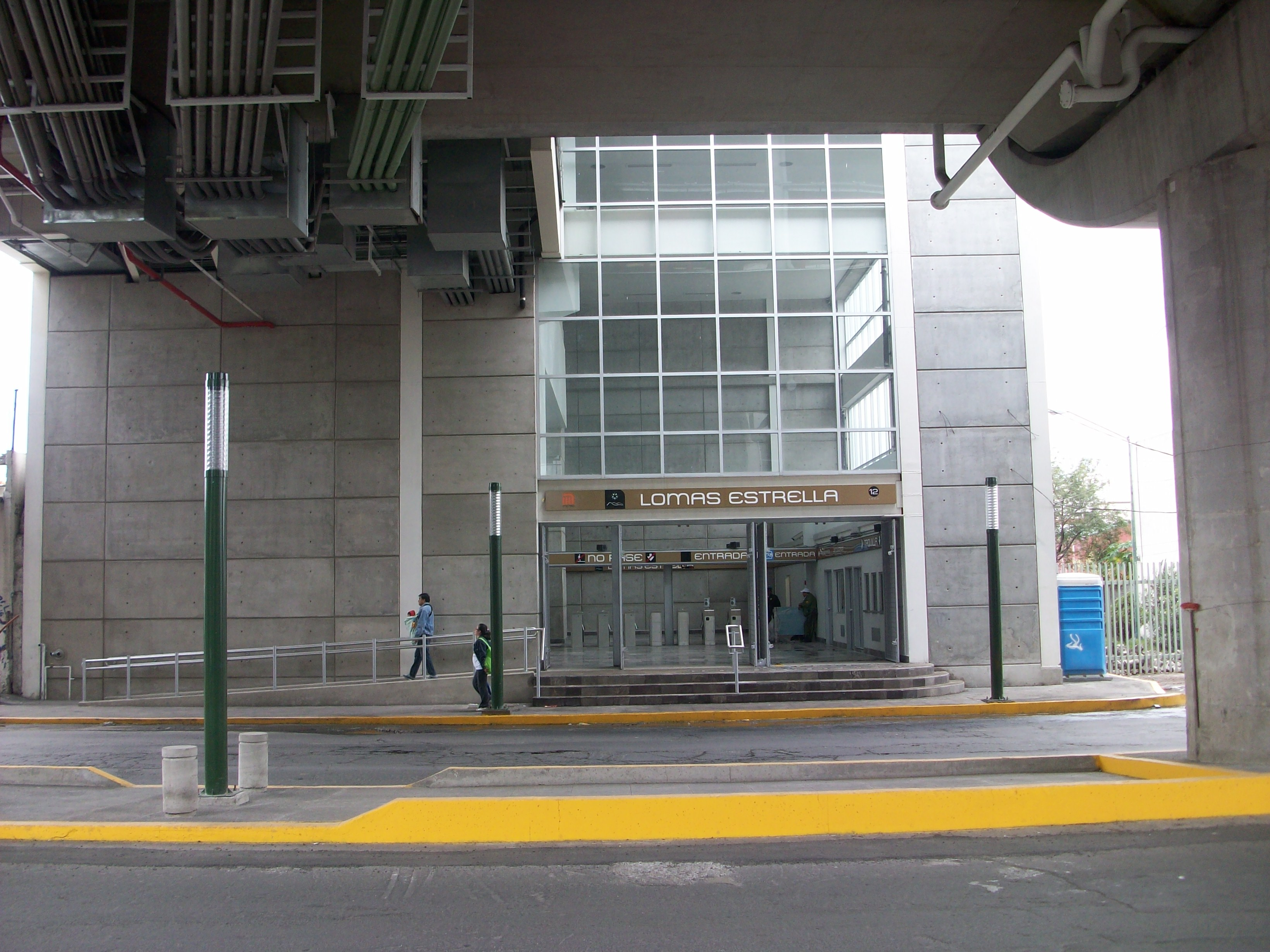 Acceso estacion Lomas estrella